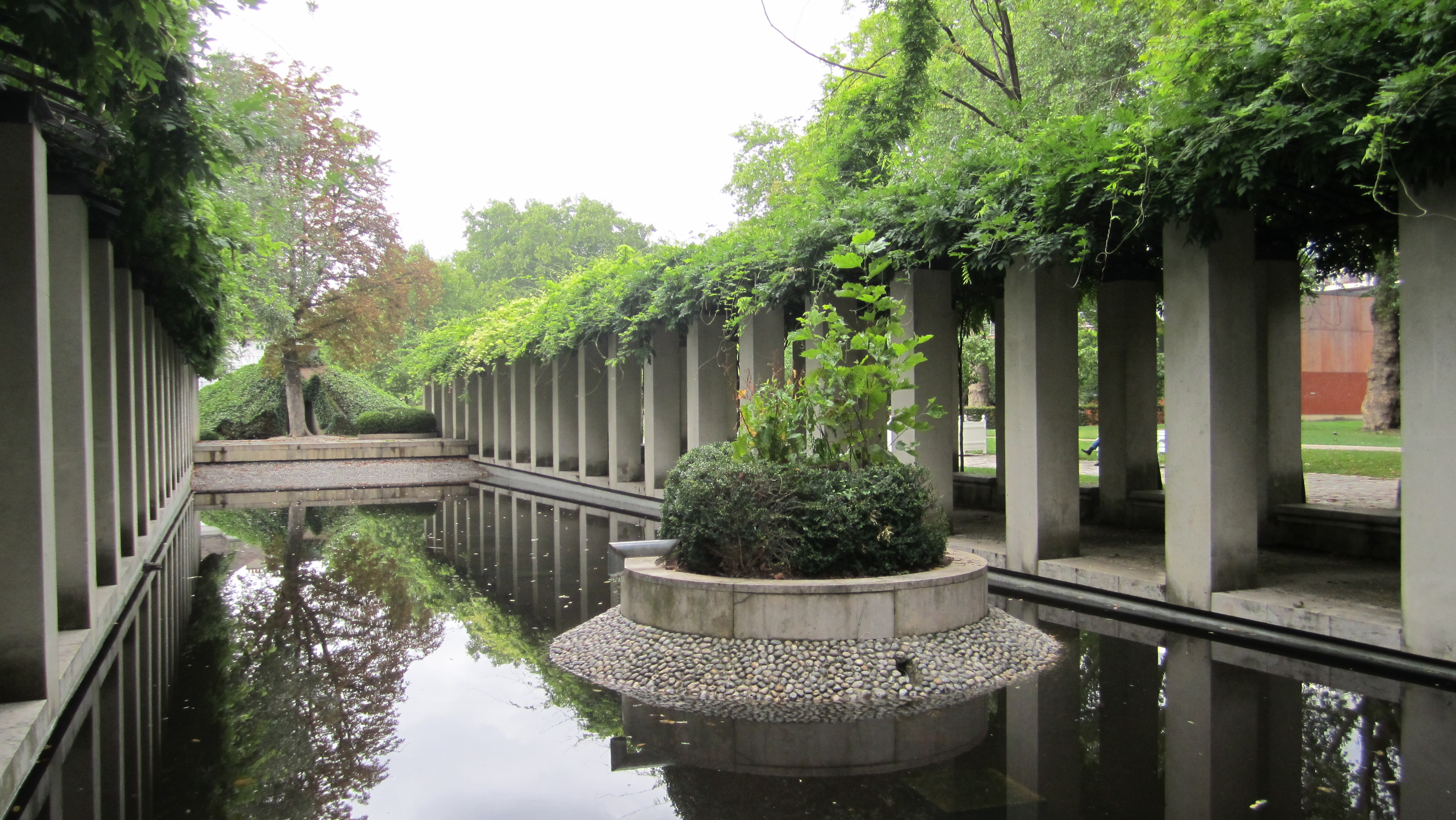 Parc de Bercy